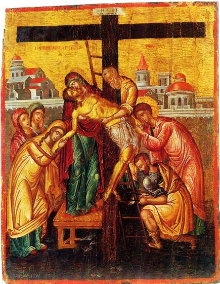 descente de croix